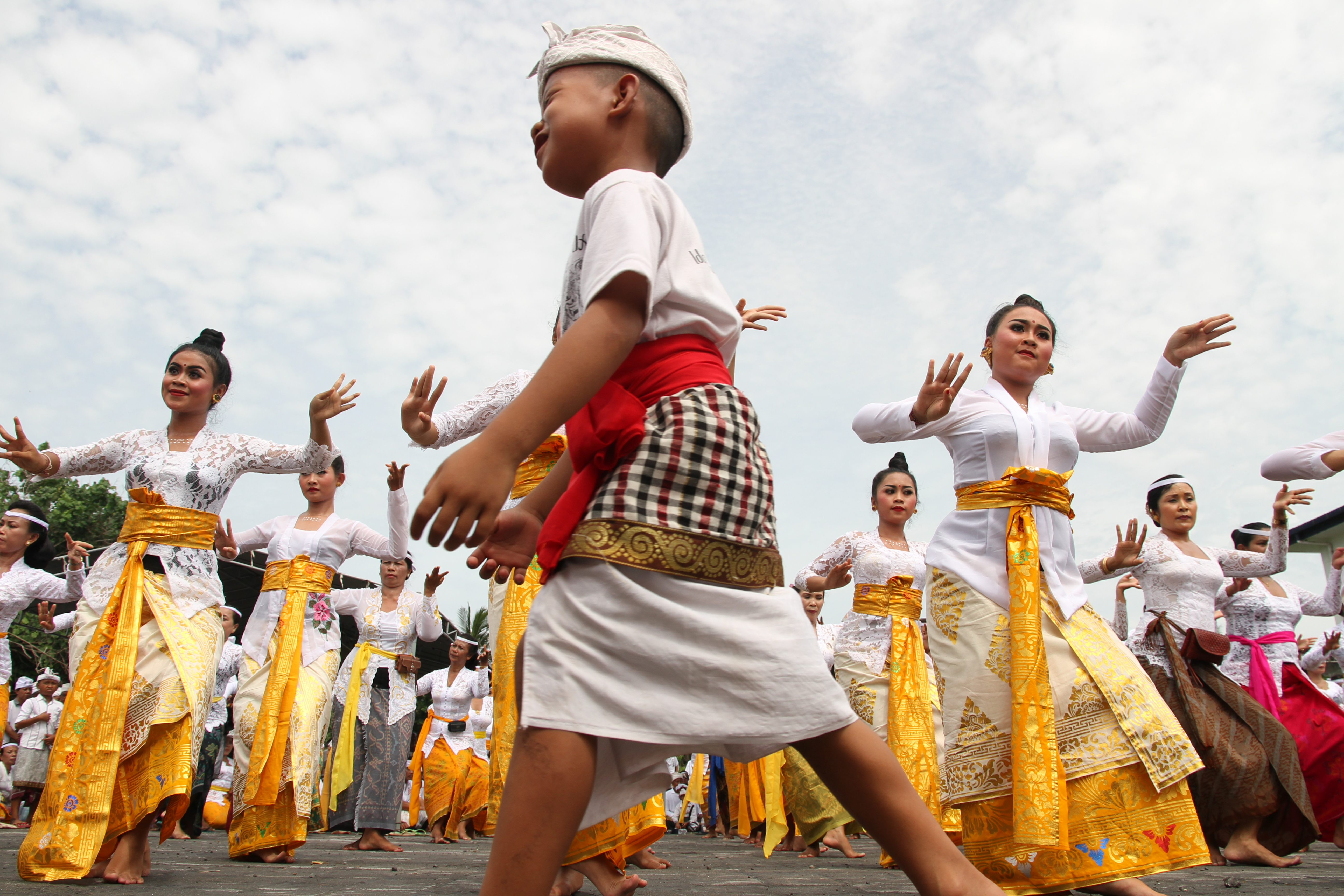 Tarian rejang renteng merupakan salah satu tarian rejang yang ada di daerah Bali. Tari rejang renteng di tarika bergroup dengan membuat barisan yang teratur dan di gelar pada saat upacara agama atau budaya di Bali